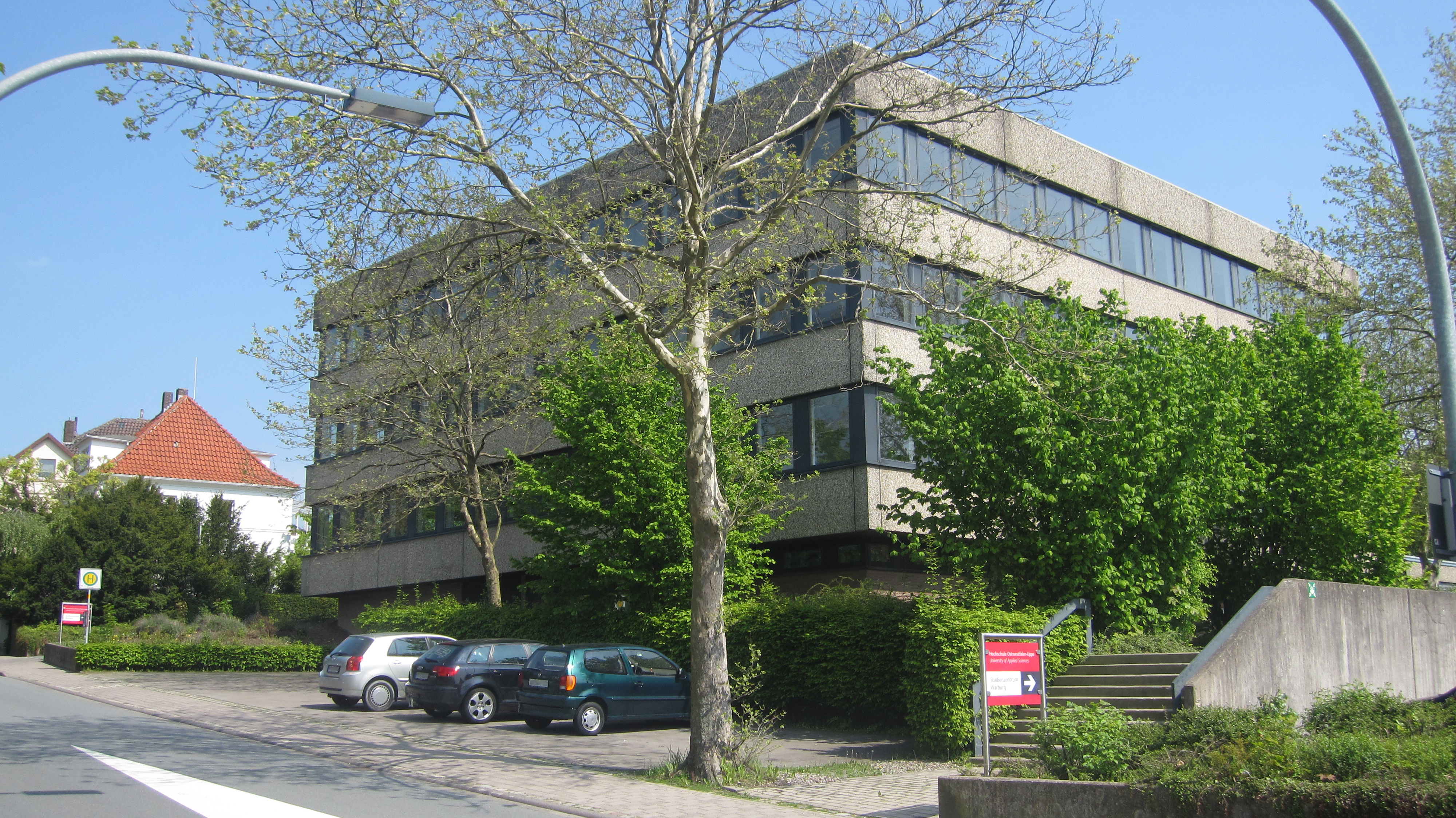 Der ehemalige Studienstandort Warburg der Hochschule Ostwestfalen-Lippe auf der Landfurt in Warburg.